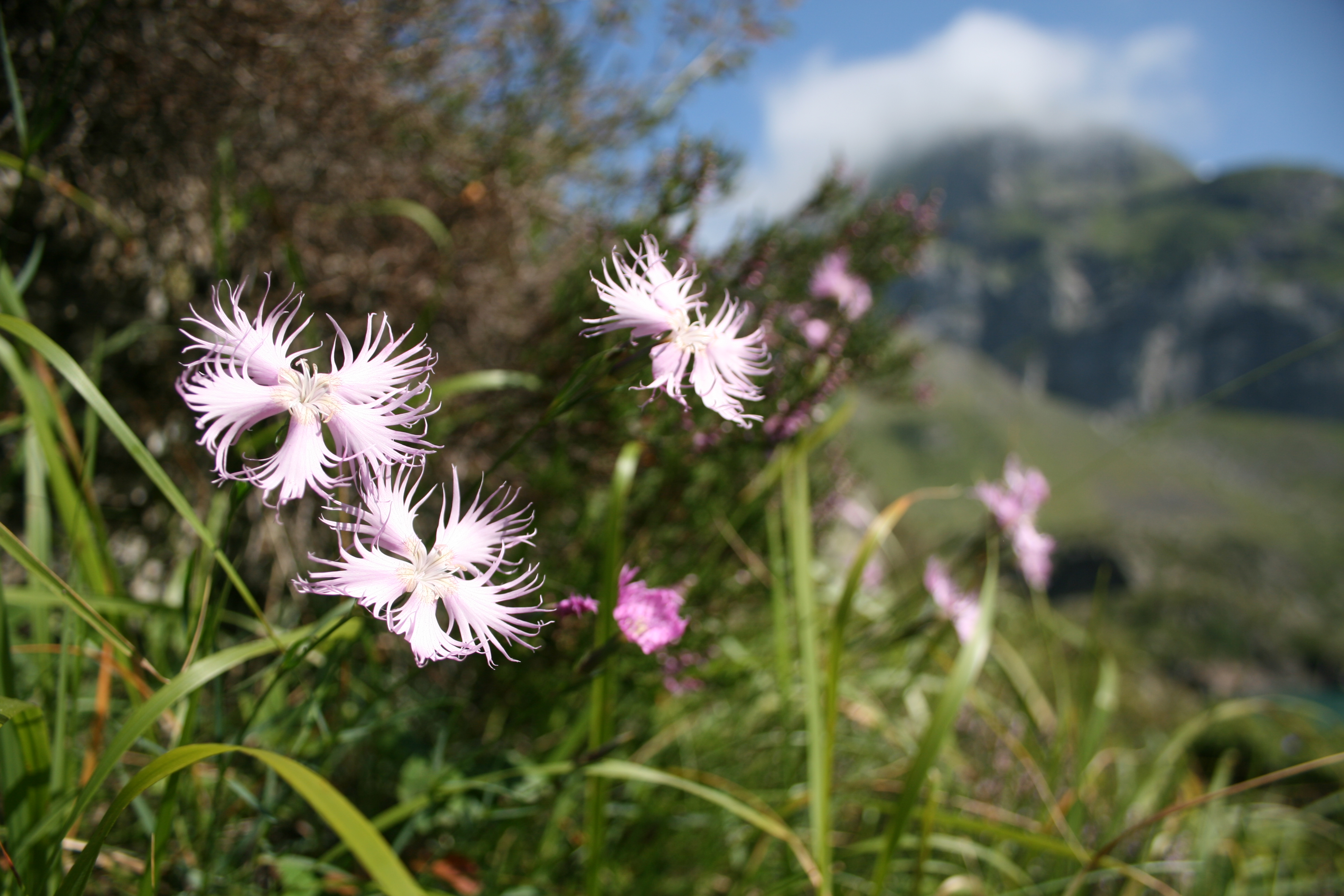 Fleur oeillet des pyrenees (Dianthus hyssopifolius). Photo prise dans la vallé Luz - Gavarnie - Baréges. Cabane d'estaubé à 1765 m d'altitude.